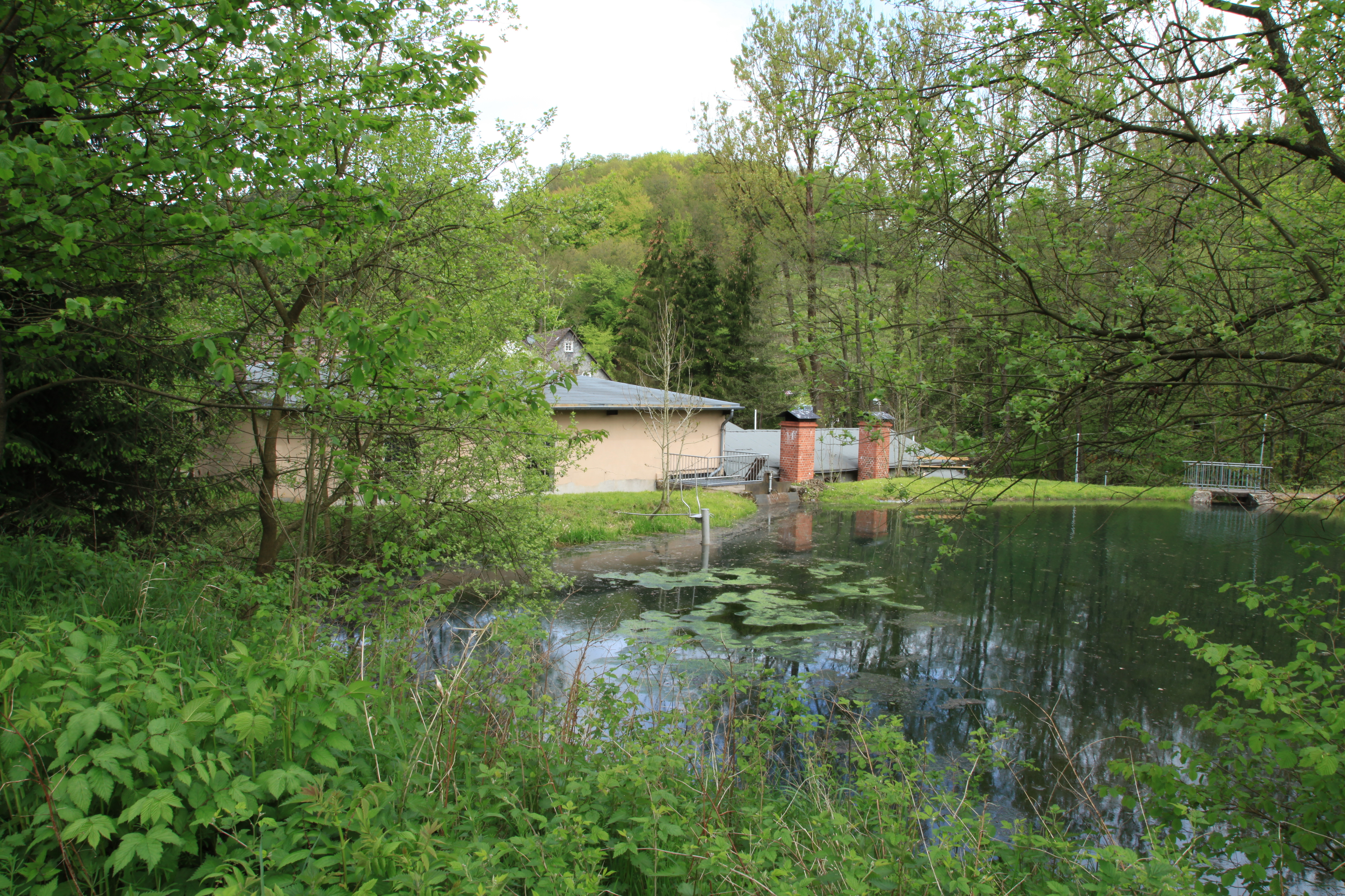 Schleiper Hammer, Schleipe in Kierspe-Schleipe